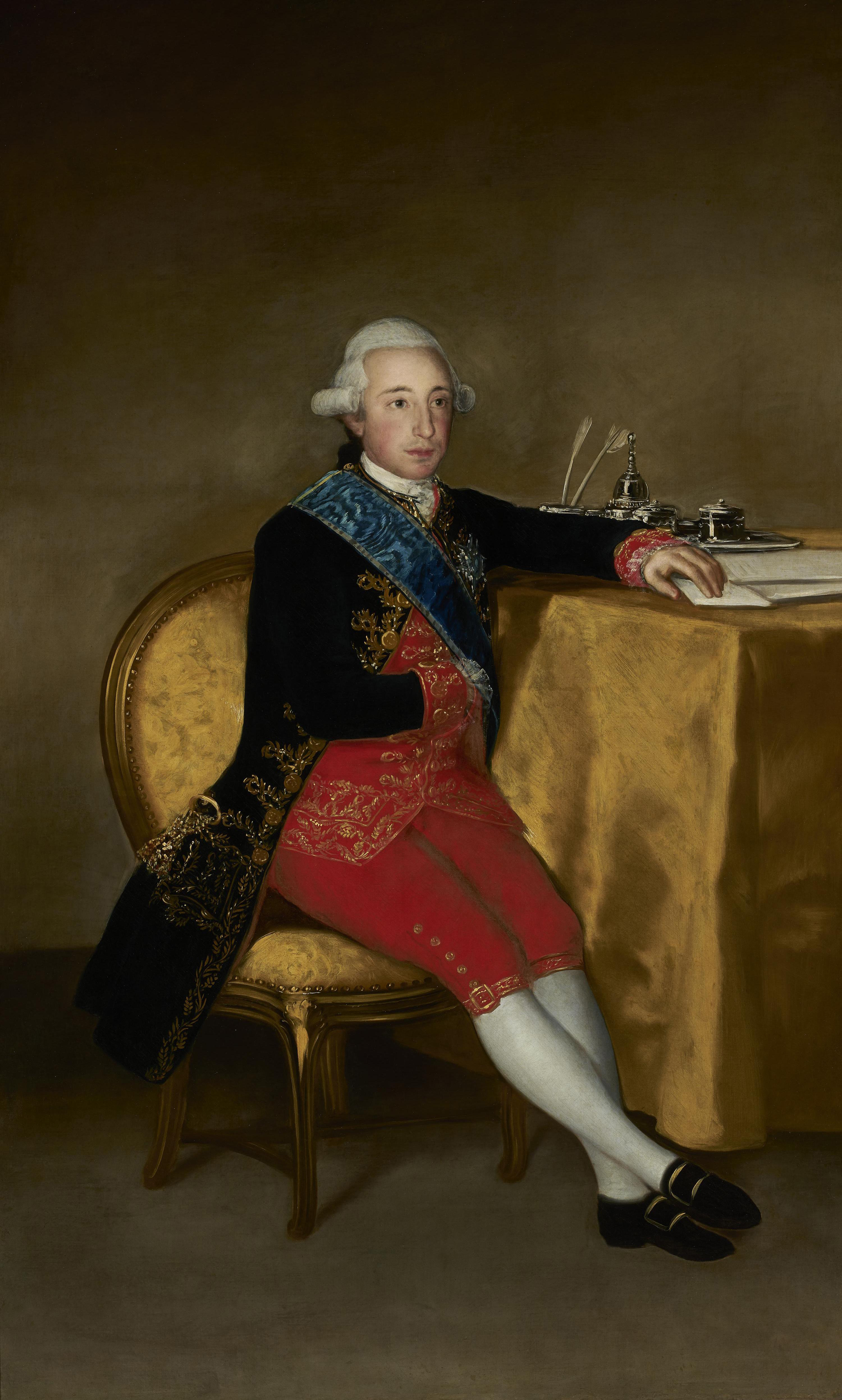 Retrato del aristócrata español Vicente Joaquín Osorio de Moscoso y Álvarez de Toledo (1777-1837), XIII conde de Altamira, XVI duque de Maqueda, XIV duque de Medina de las Torres, XVI marqués de Astorga y, también, duque de Sessa, de Sanlúcar la Mayor, de Soma y de Baena, marqués de Leganés, de Ayamonte, de Villamanrique, de San Román, de Almazán, de Poza, de Morata, de Mairena, de Elche, de Monasterio, de Montemayor y del Águila, conde de Palamós, de Lodosa, de Arzarcóllar, de Villalobos, de Nieva, de Saltés, de Garcíez, de Vallehermoso, de Cantillana, de Monteagudo, de Cabra, de Trastámara y de Santa Marta, vizconde de Iznájar, barón de Bellpuig y 13 veces Grande de España. En su época fue uno de los nobles más ricos de España, y también fue uno de los primeros directores del Banco de San Carlos.